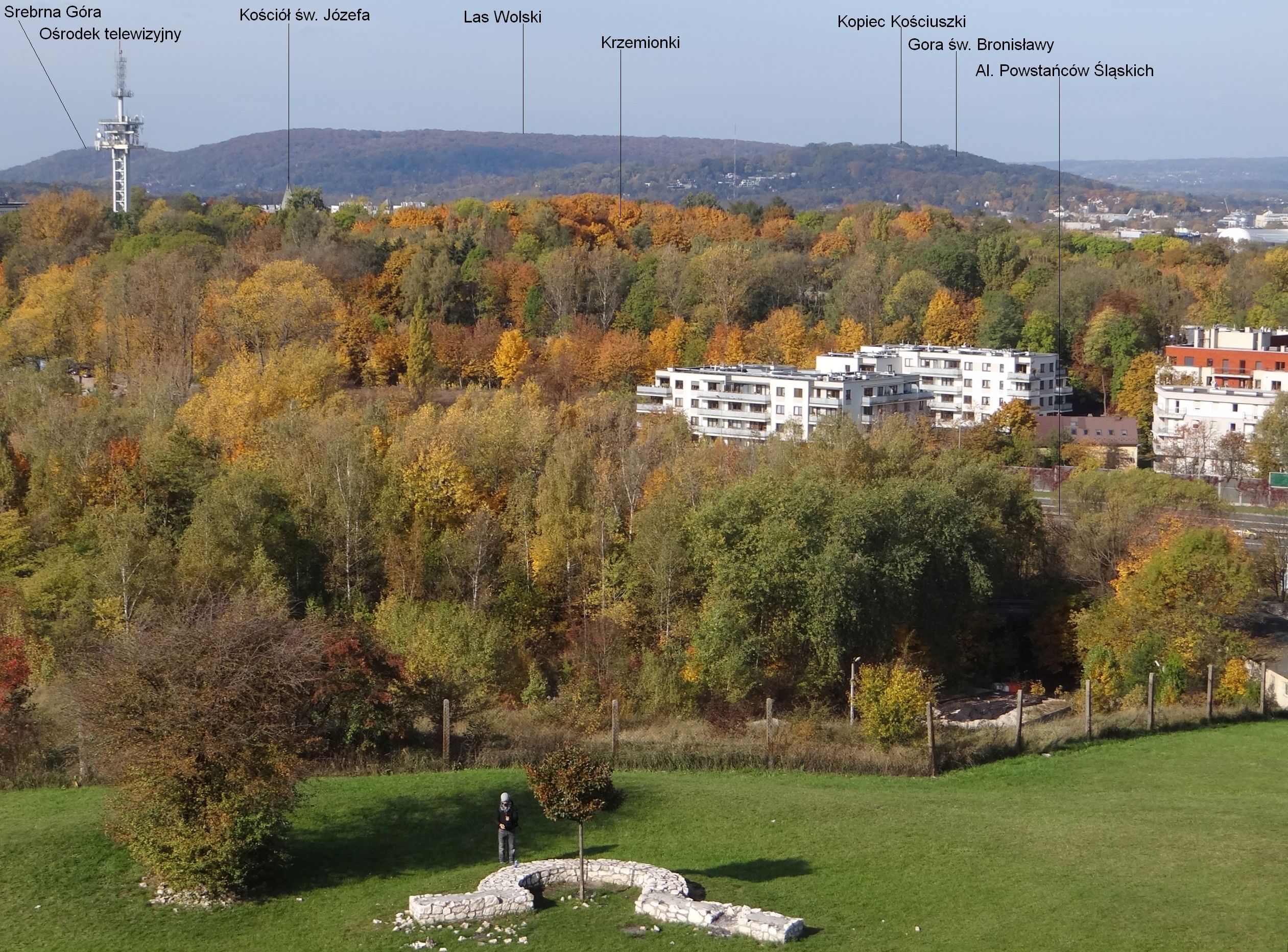 Krzemionki Podgórskie w Krakowie. Widok z Kopca Krakusa